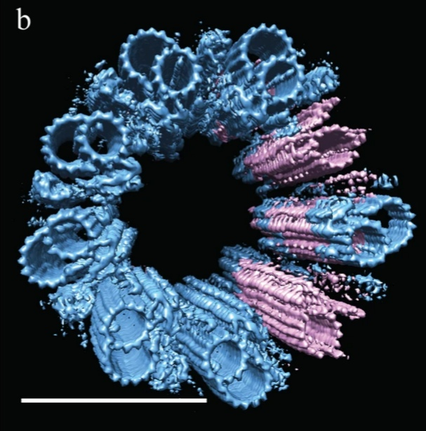 Fig. 7. Los túbulos B incompletos arrojan luz sobre cómo se construyen los túbulos B en las células Drosophila S2. b) Se reajustó un centríolo para mostrar las posiciones de los dobletes completos e incompletos, dentro del contexto del centríolo completo, y esto sugirió que los dobletes incompletos tienden a agruparse, tanto a lo largo del eje proximal-distal como alrededor del eje radial del centríolo. Barras de escala= 100 nm.